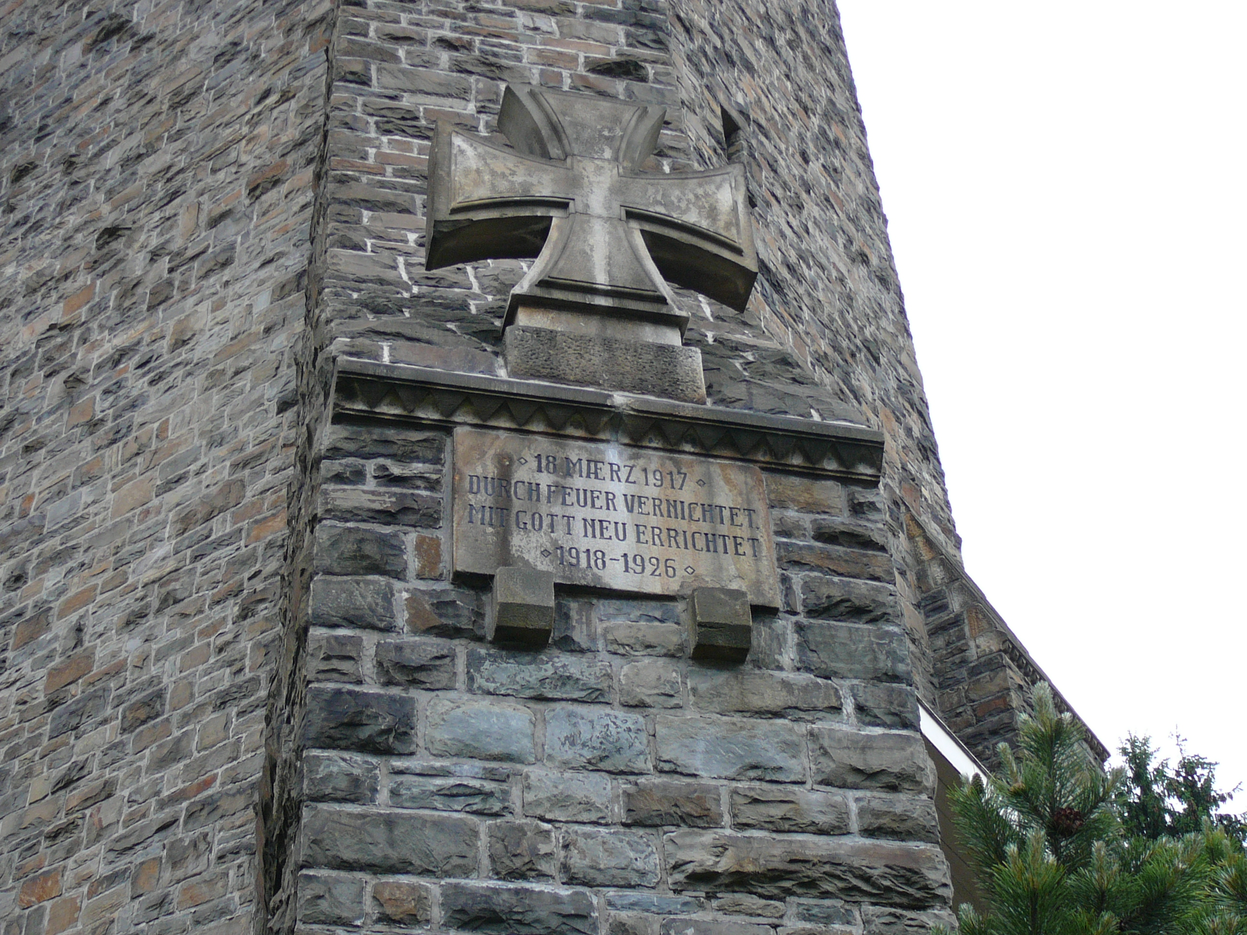 Hauptkirche Sonnborn, Wuppertal